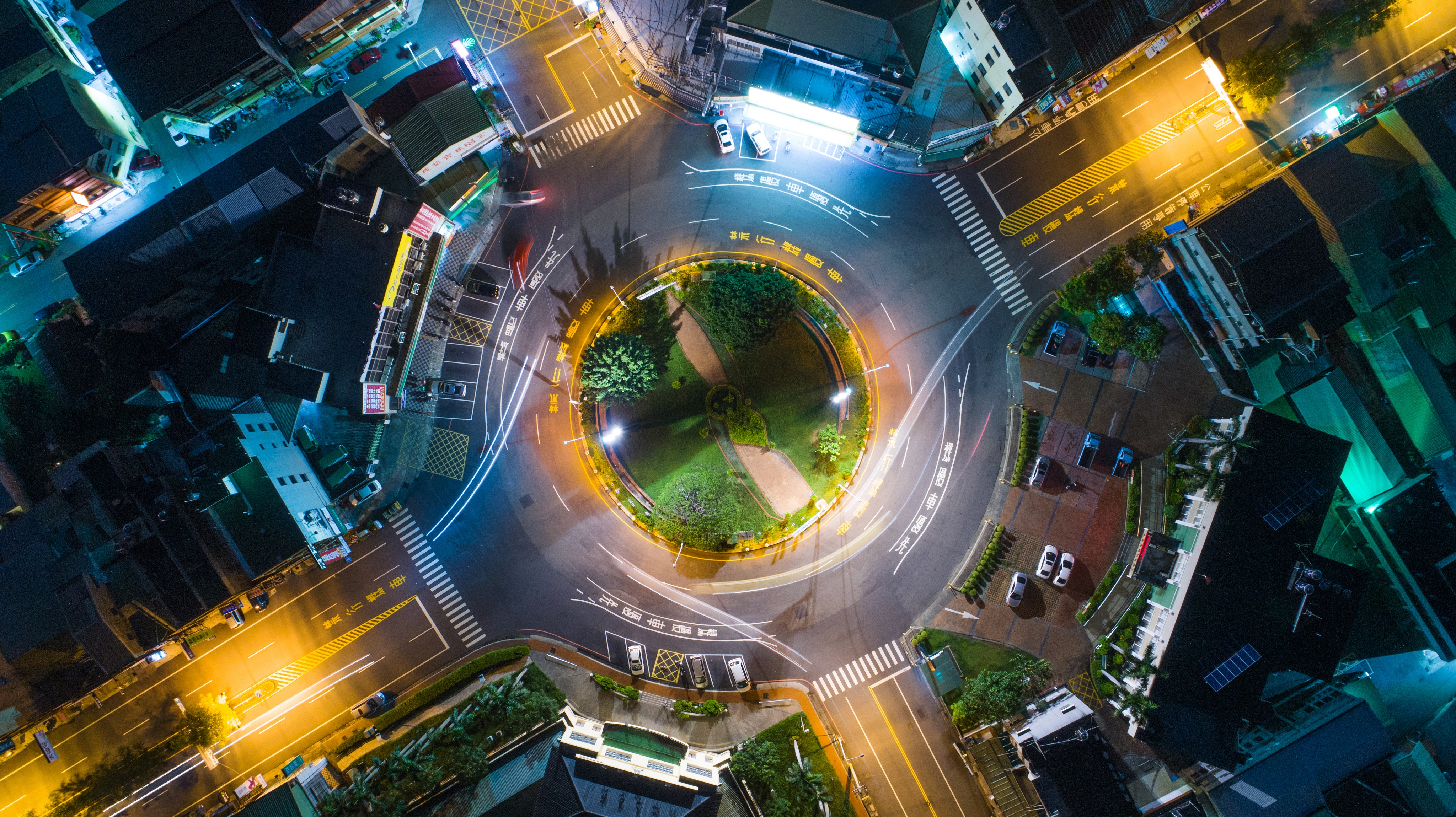 中文（台灣）: 夜間的歸仁圓環